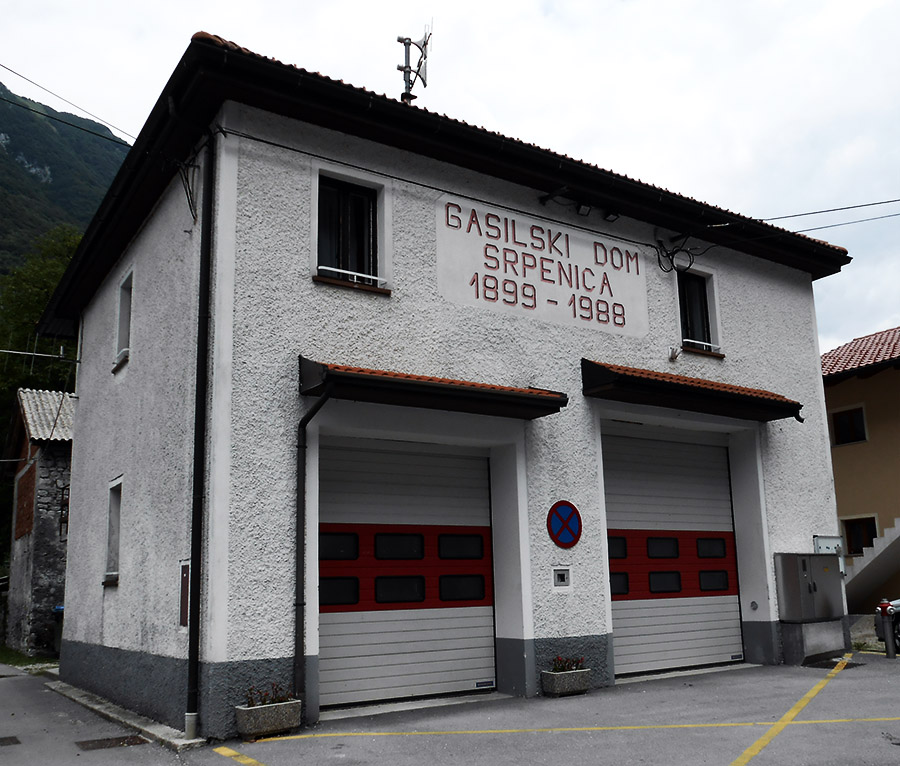 Gasilski dom Srpenica